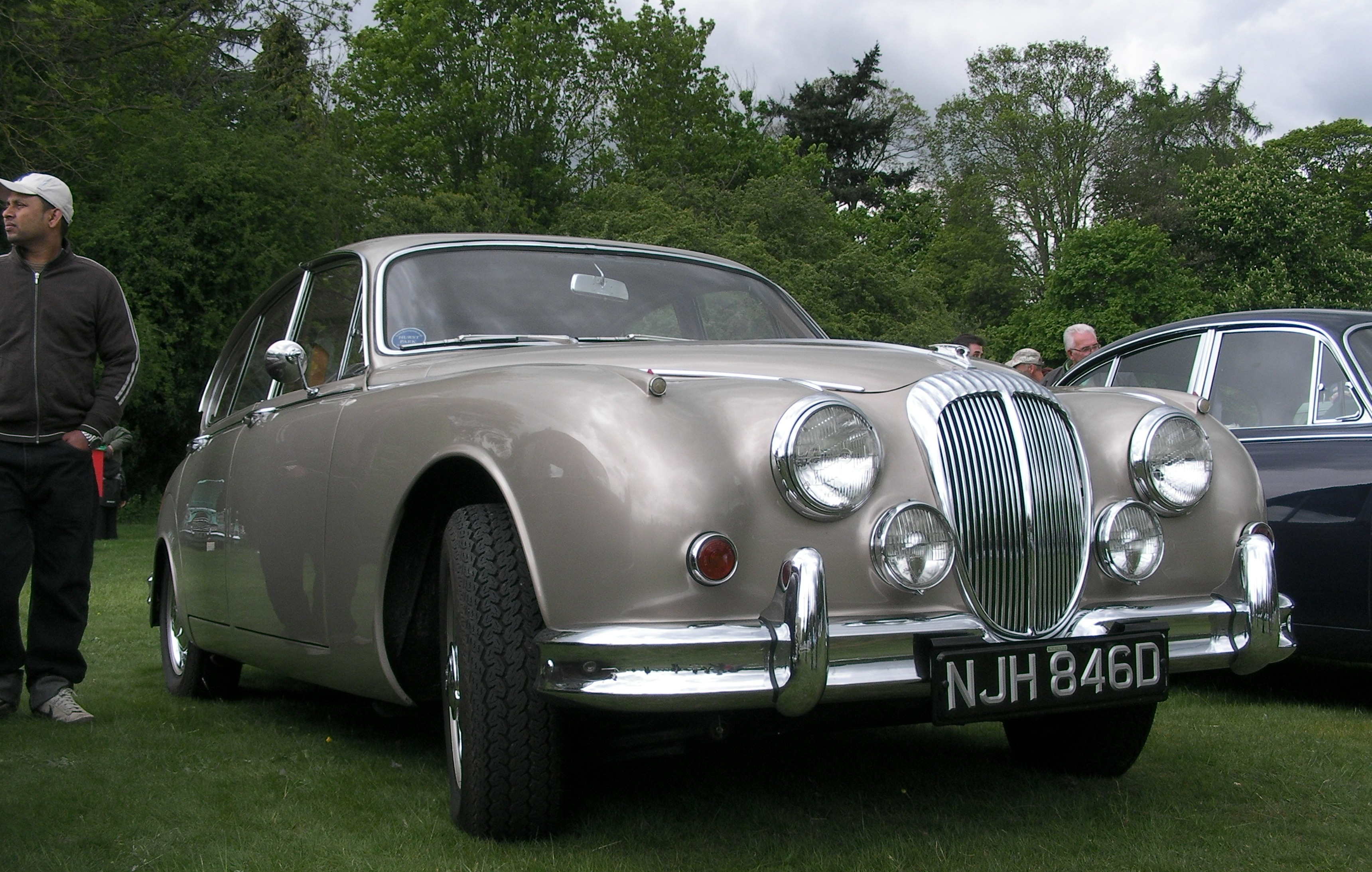 Daimler V8